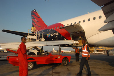 Airbus A 320